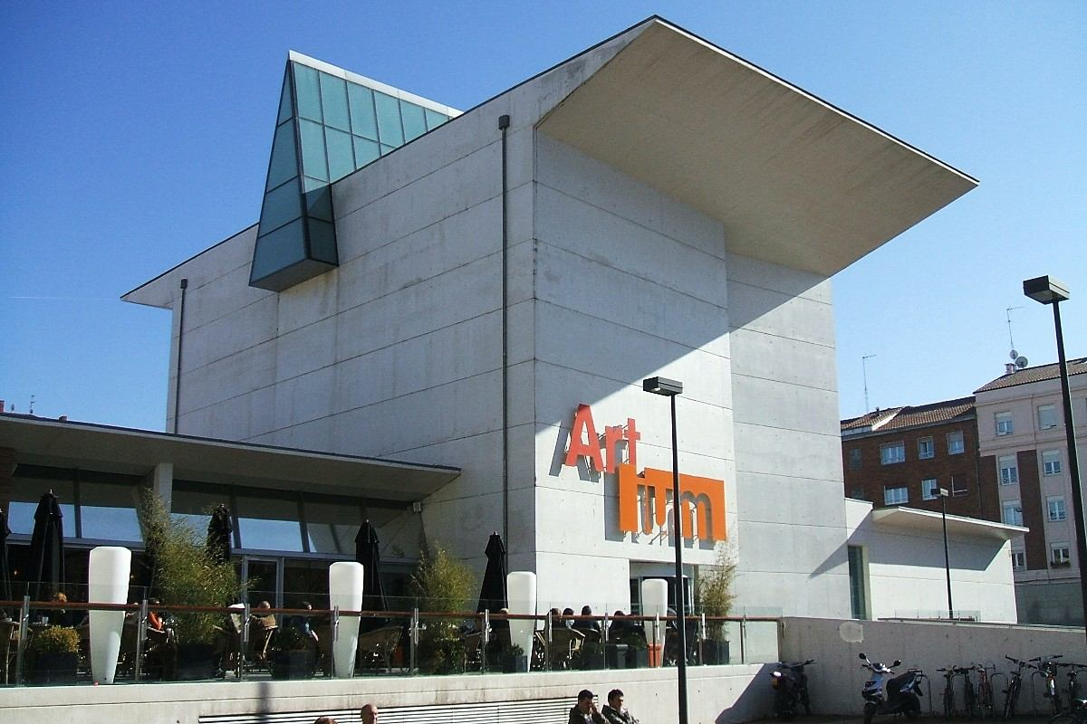 Museo Artium, Vitoria-Gasteiz